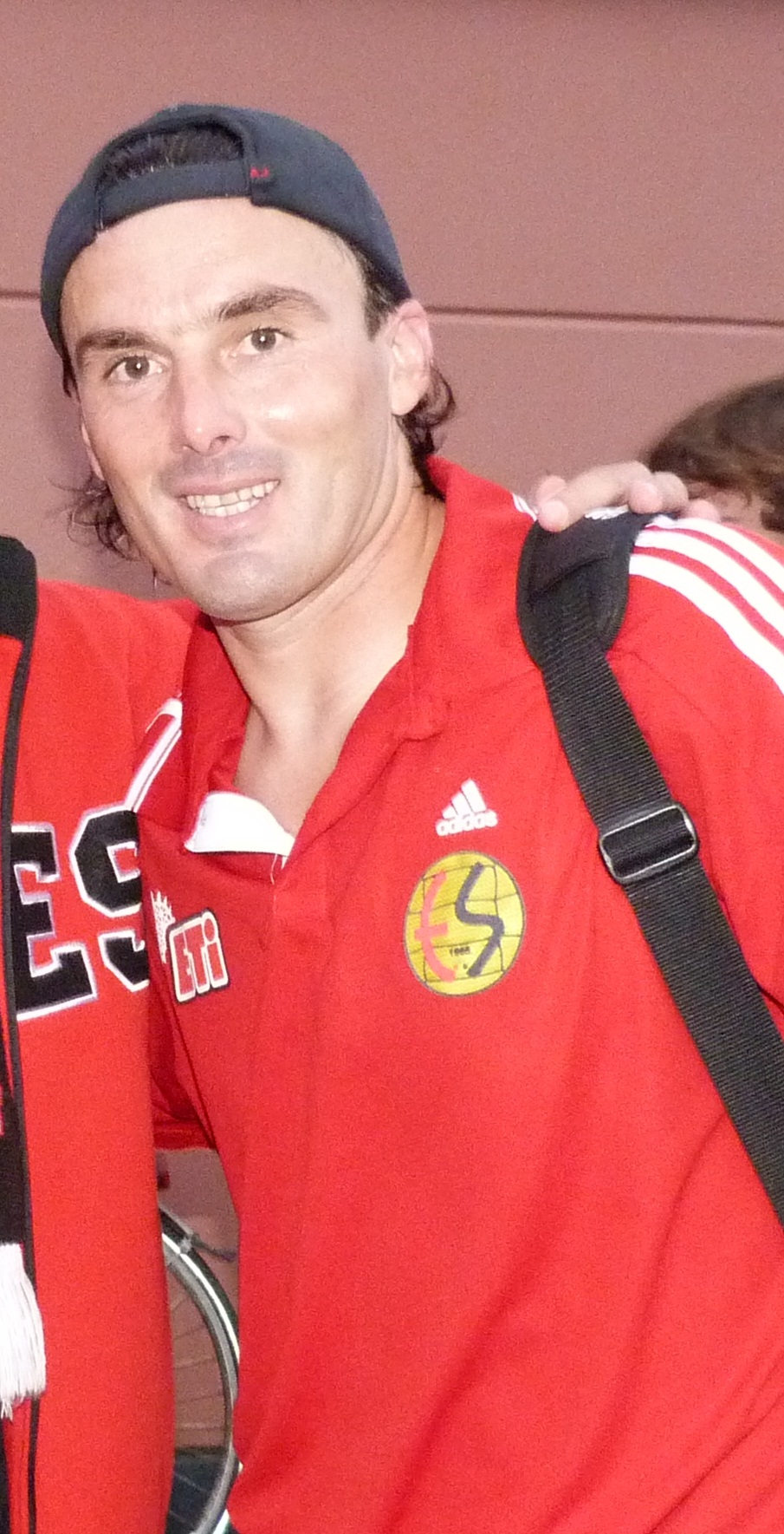 S. Nadarevic